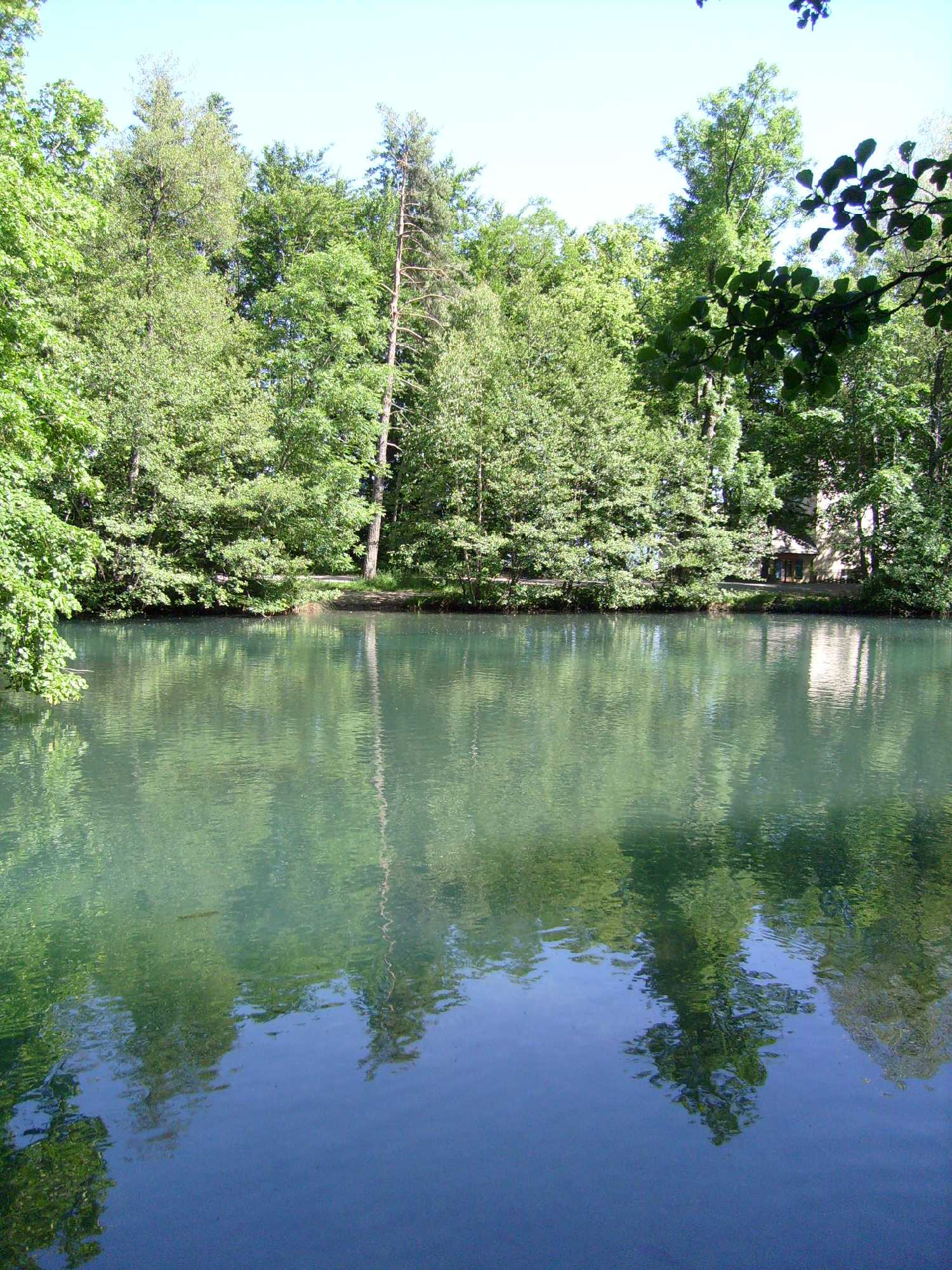 Lac de Charance( Gap, Hautes-Alpes)